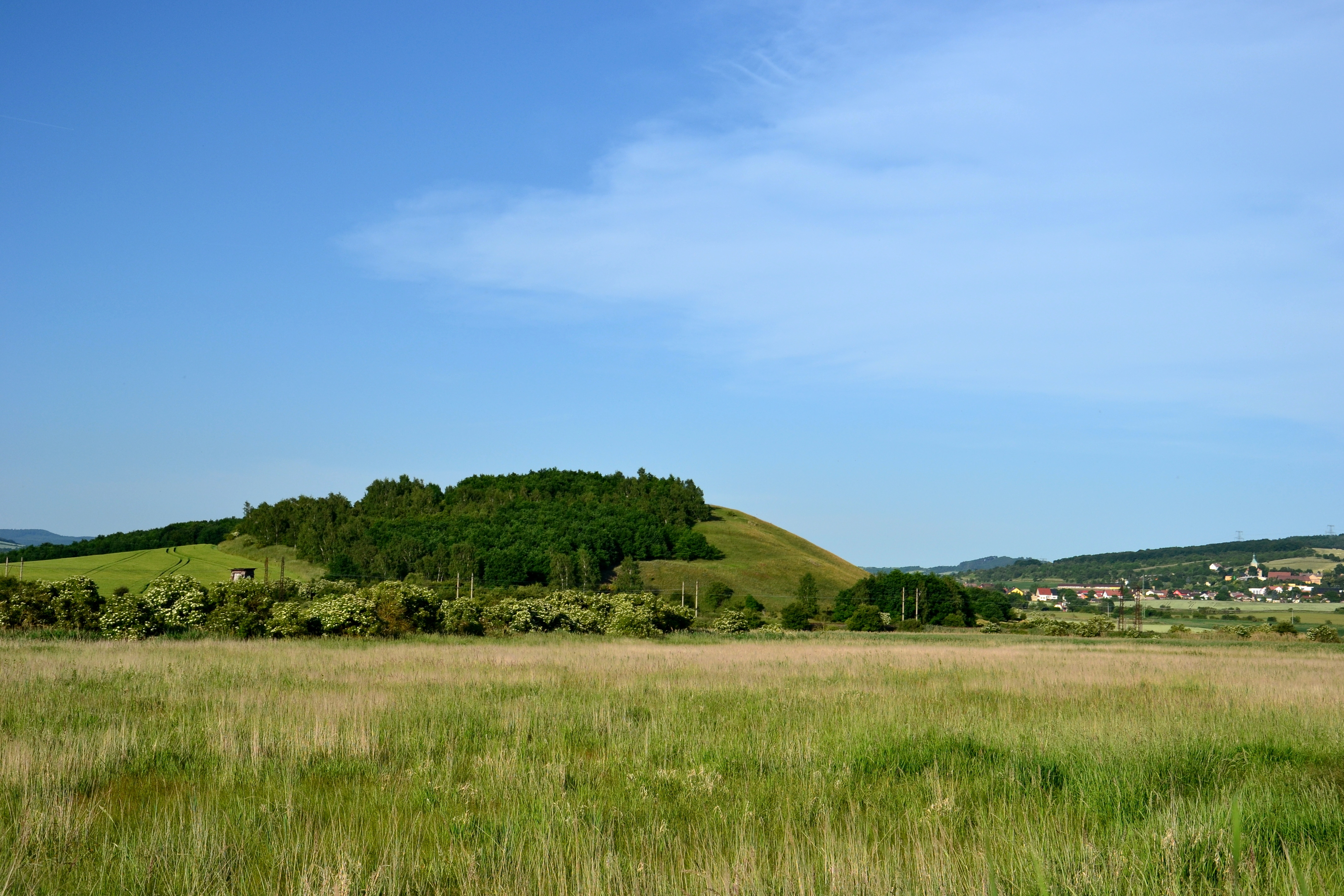 Vrch Chlum od západu